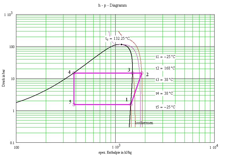 p-h-Diagramm für einen Kühlprozess mit NH3